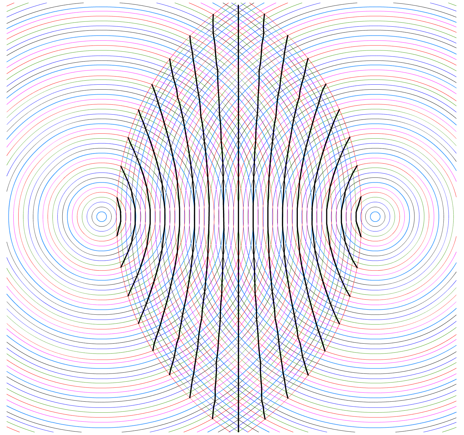 Hyperbelnavigation